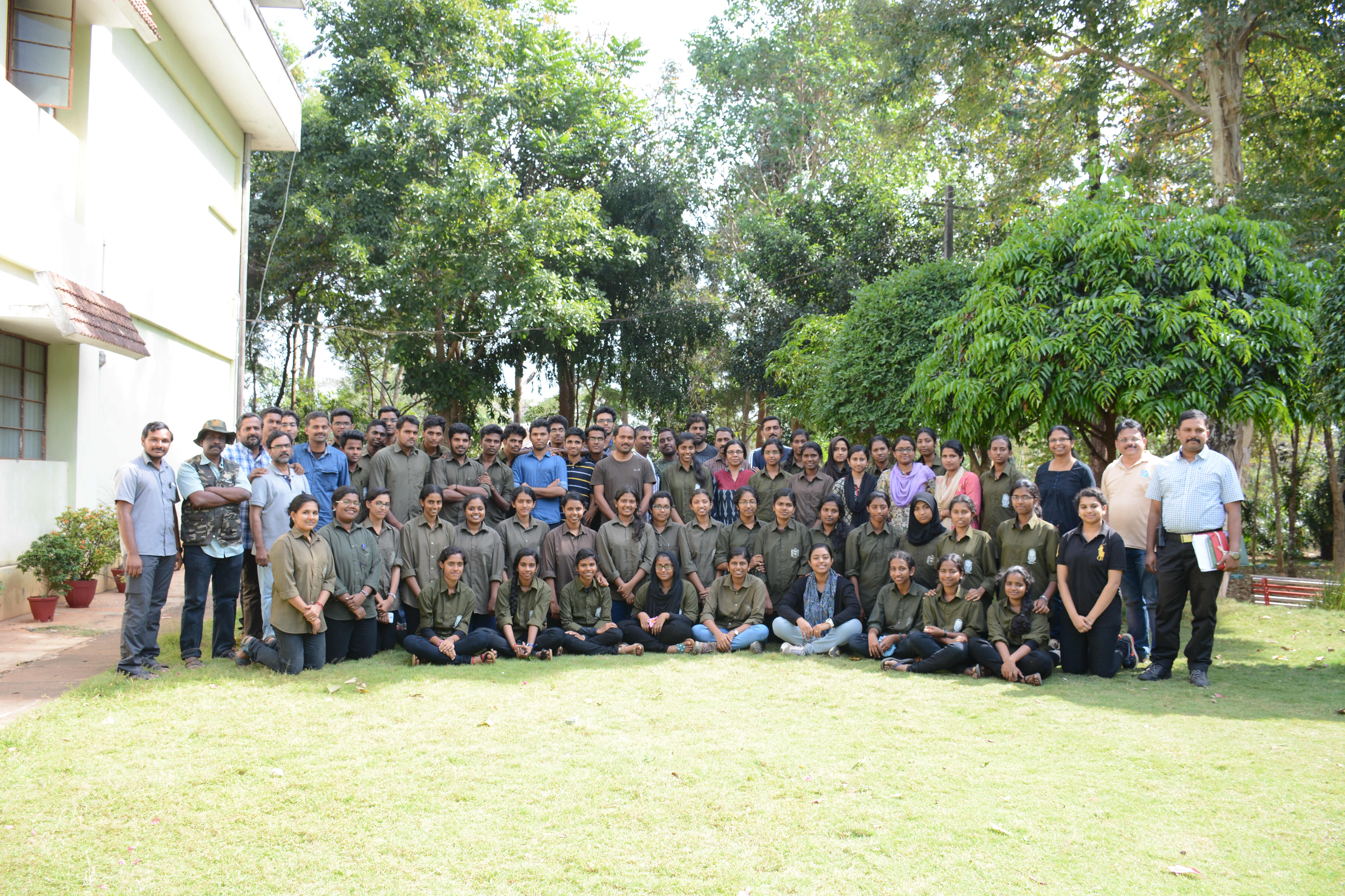 കോൾ സർവ്വെ 2017 ഗ്രൂപ്പ് ഫോട്ടോ.